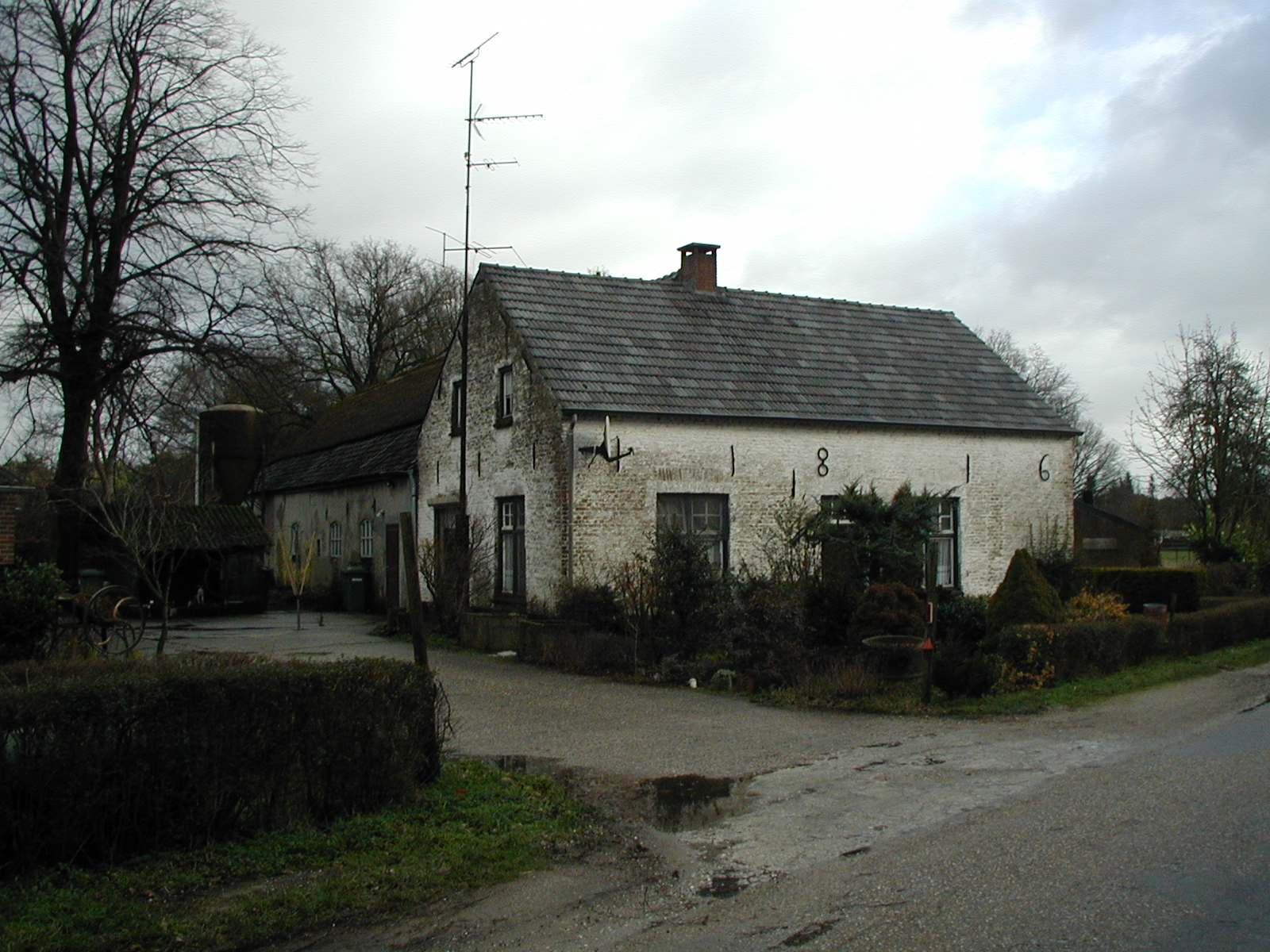 Foto zelf gemaakt op 1 februari 2004. Keunen